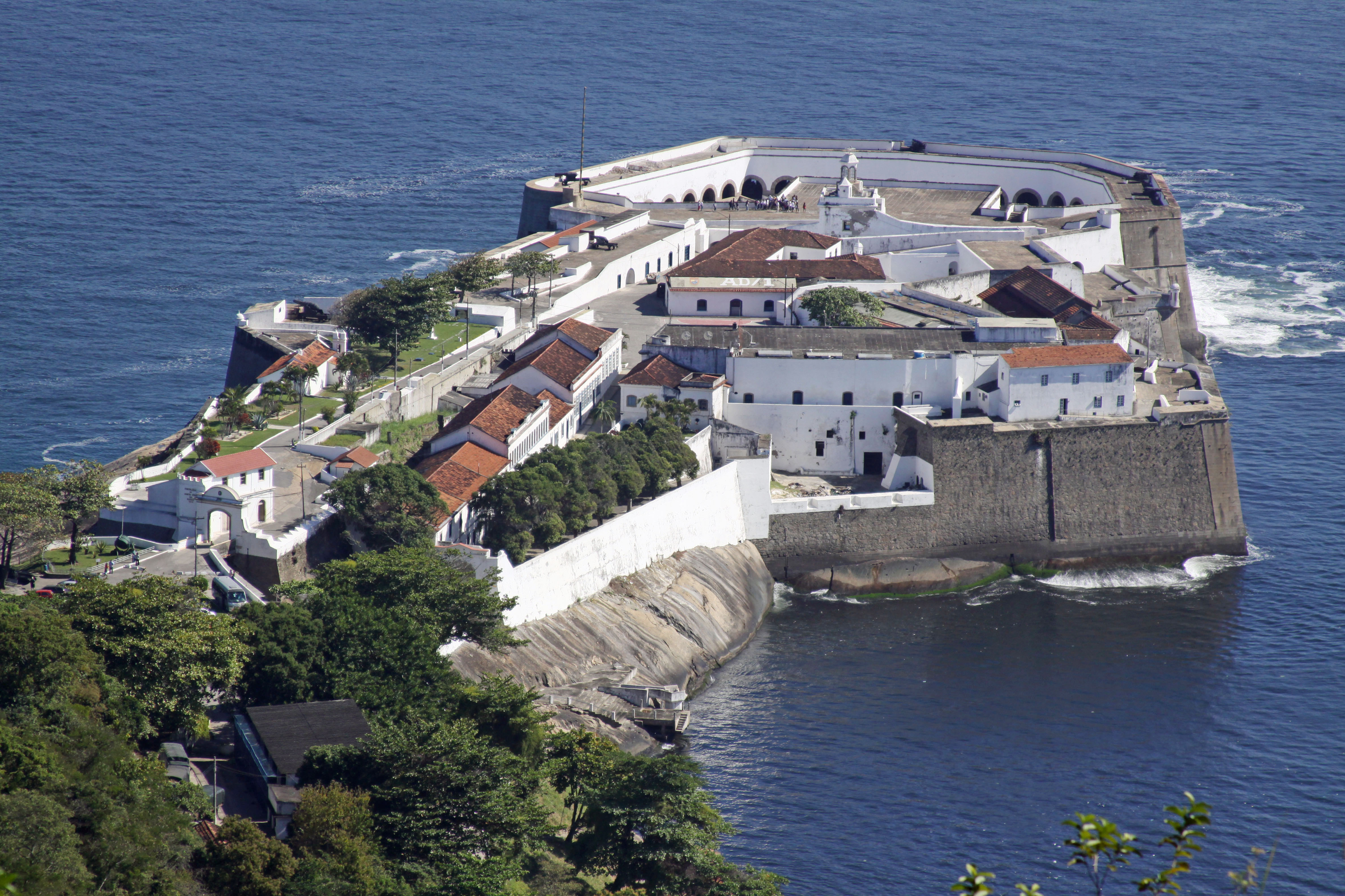 Fortaleza de Santa Cruz da Barra, Niterói, Rio de Janeiro, Brasil. Vista a partir do Forte do Pico.